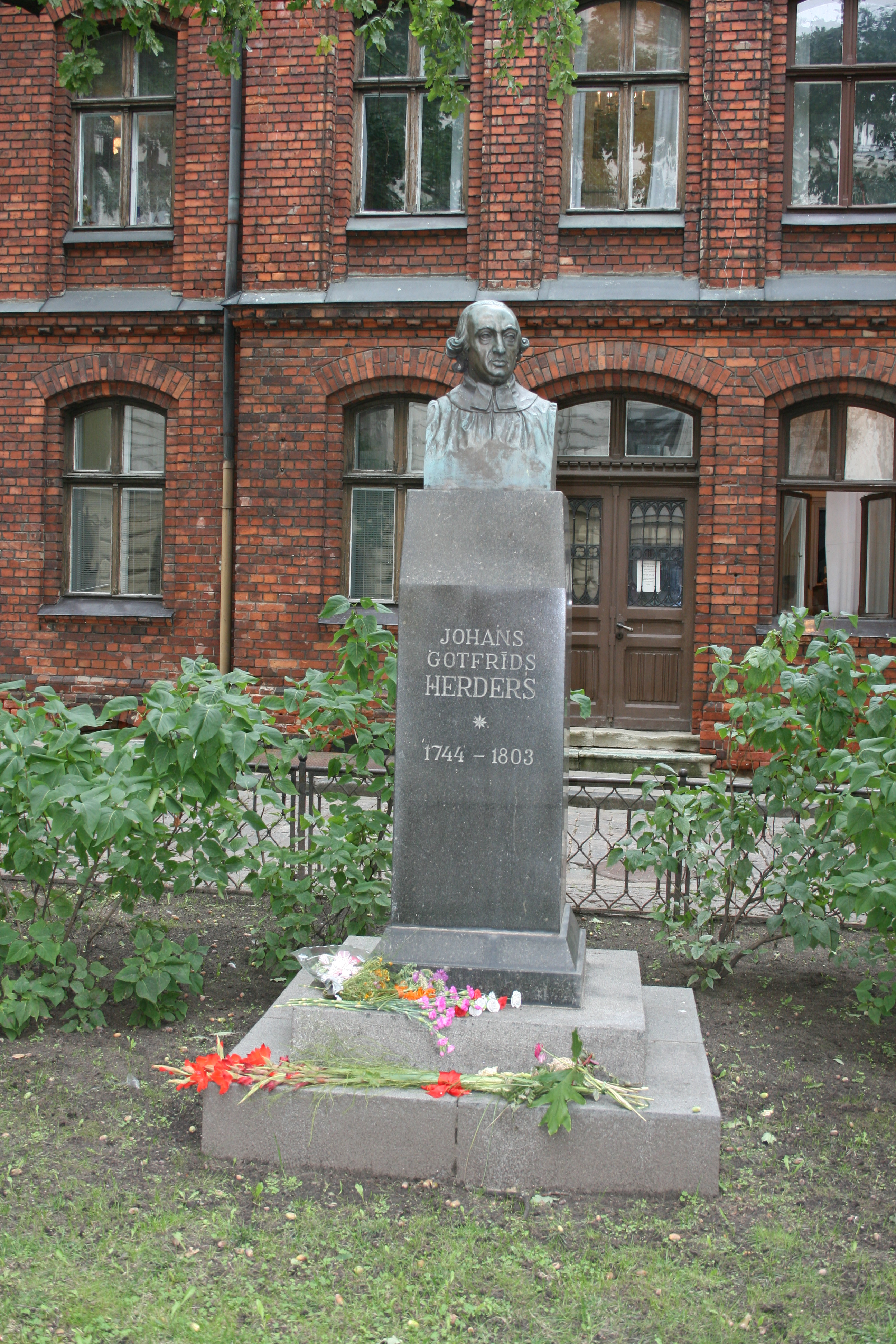 Das Denkmal von Johann Gottfried Herder in Riga nahe dem Domplatz